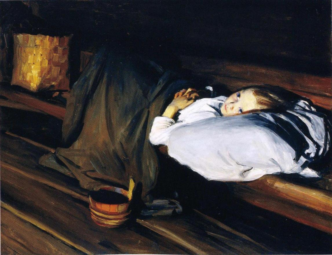 Albert Gebhardin maalaus Orpo.